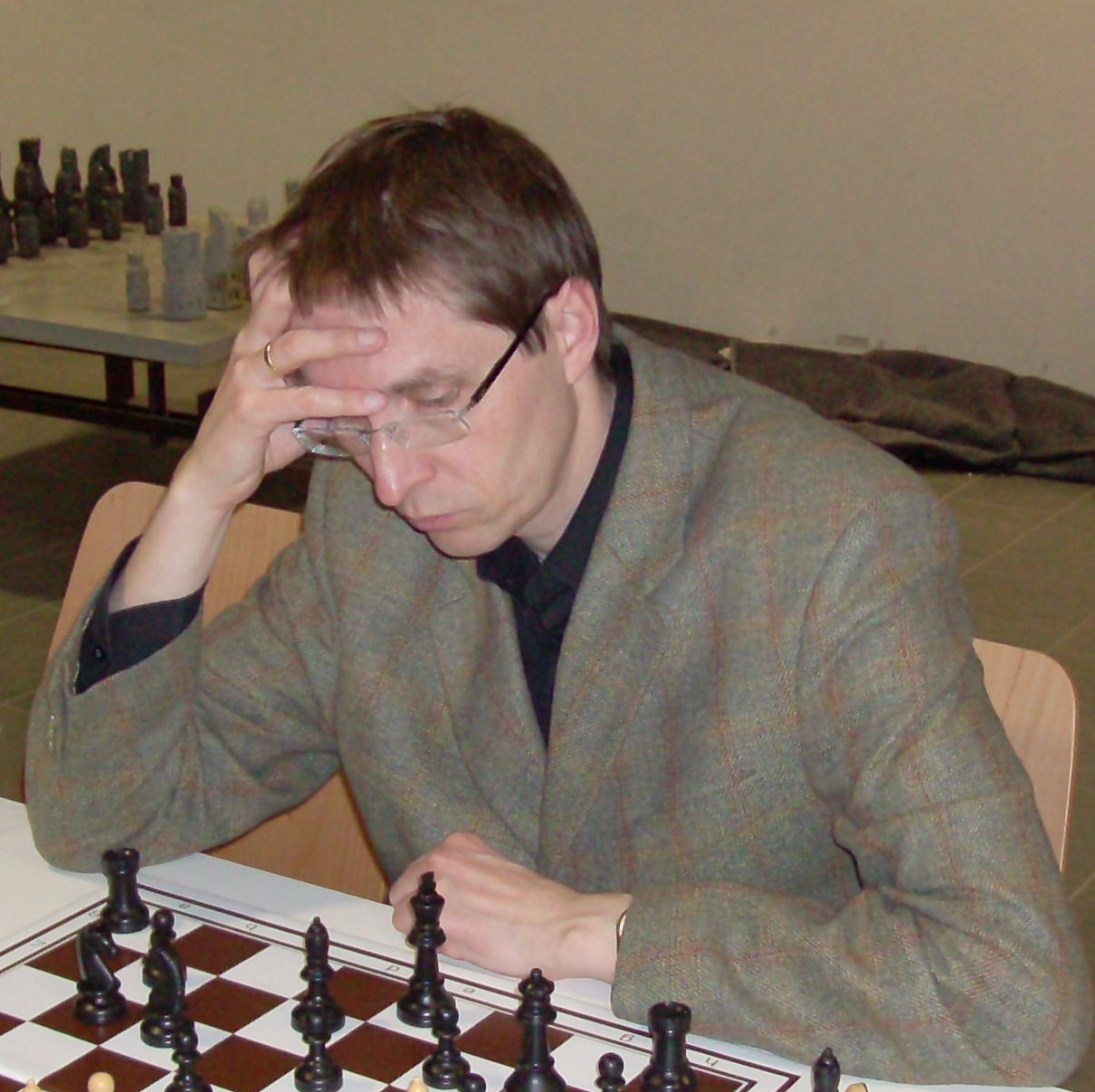 Stefan Kindermann, Austrian chess grandmaster